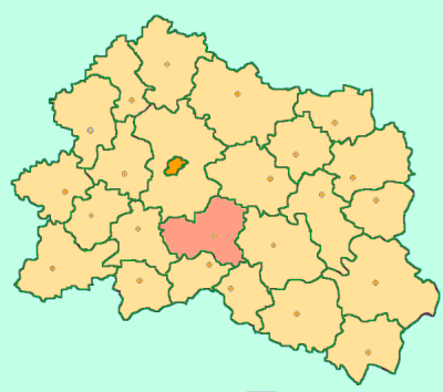 Orel Oblast map by Al Silonov Карта районов Орловской области